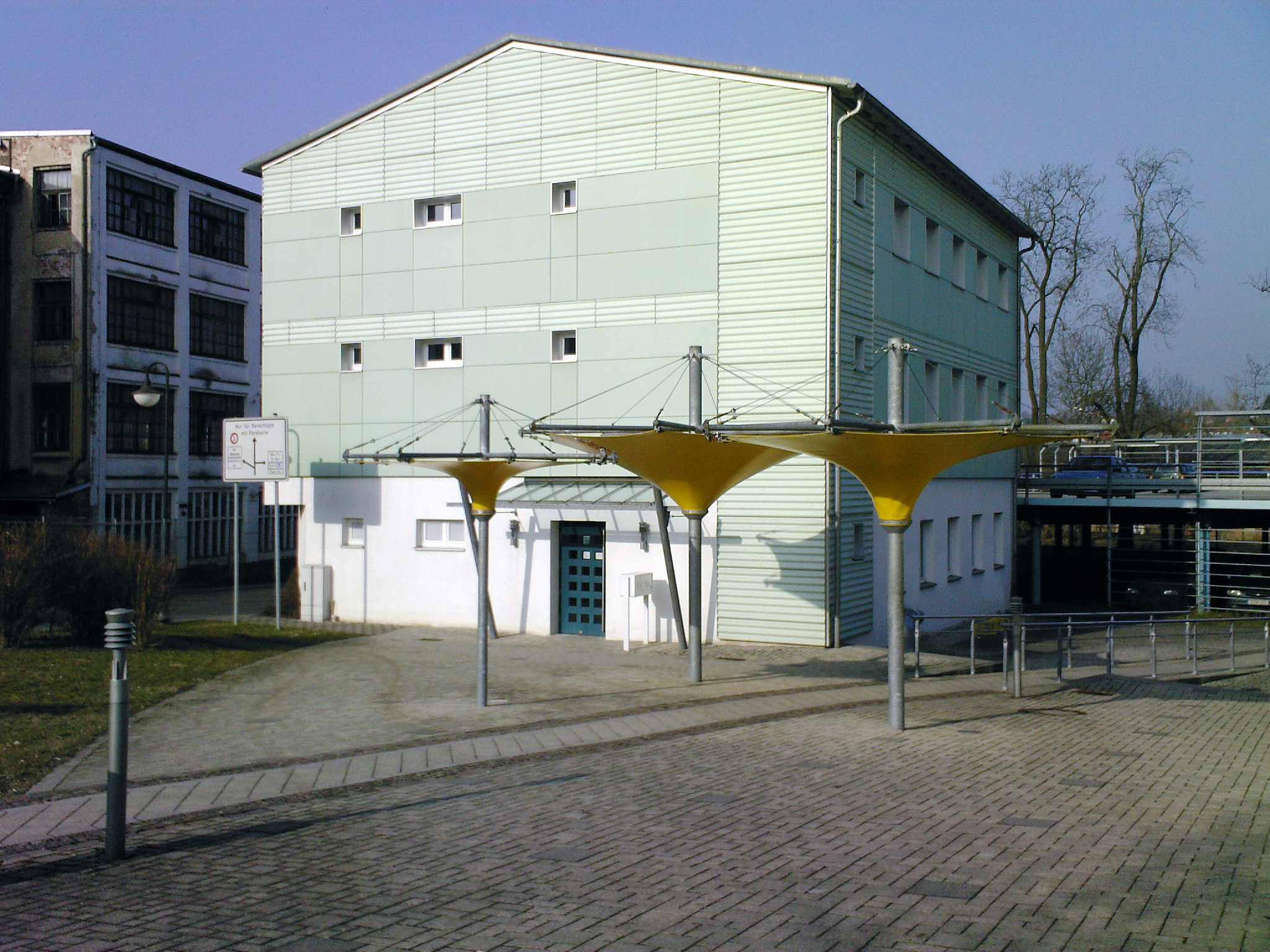 Vereinshaus (am Parkdeck), mit Spielstätte des 1. BC Neustadt (Orla) im Erdgeschoss, namentlich "Cabka-Arena".